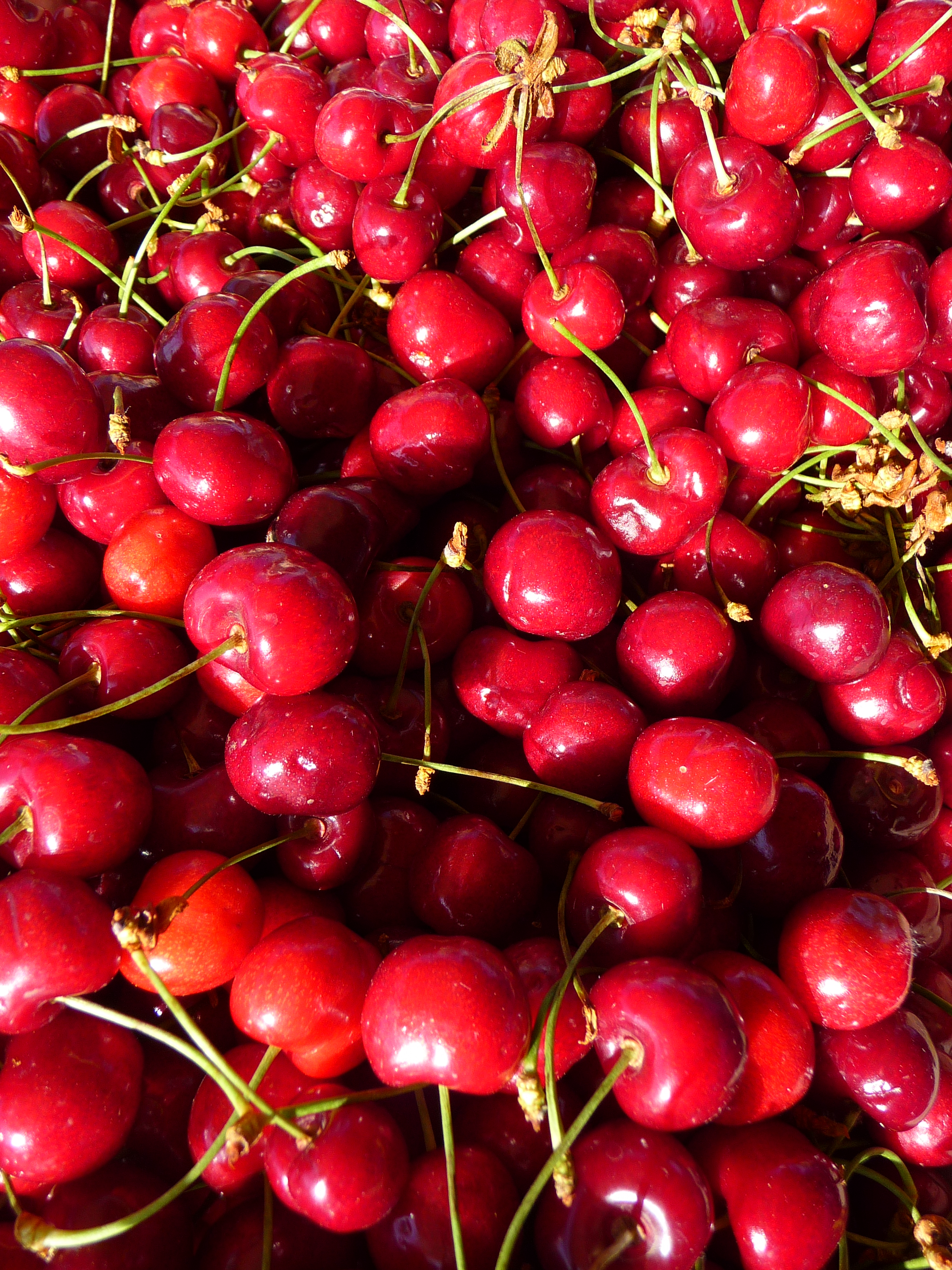 Italienische Süßkirschen (Prunus avium), fotografiert an einem Marktstand Heidelberg (Baden-Württemberg, Deutschland)